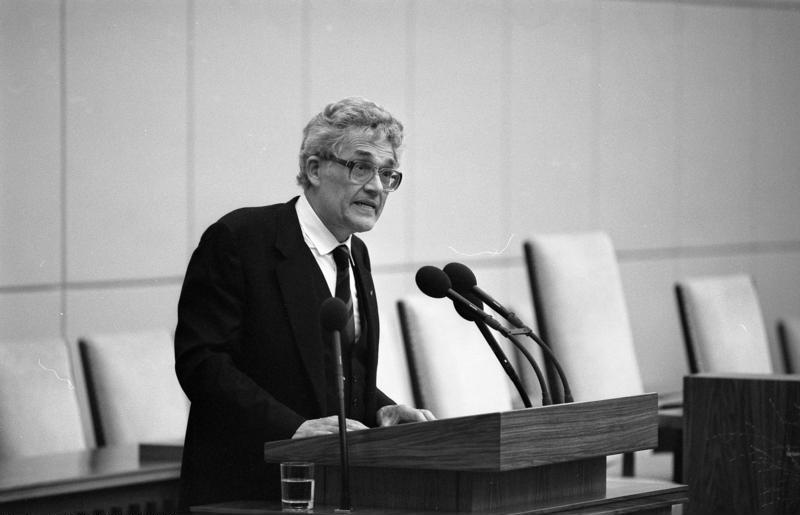 22.9.1988 Festakt im Plenarsaal des Bundesrates anläßlich des 40. Jahrestages der 1. Sitzung des Parlamentarischen Rates an gleicher Stelle. Eine von Bundesrat-Präsident, Ministerpräsident Dr. Bernhard Vogel enthüllte Gedenktafel erinnert an dieses historisches Datum. Festredner: Prof. Dr. Rudolf Morsey